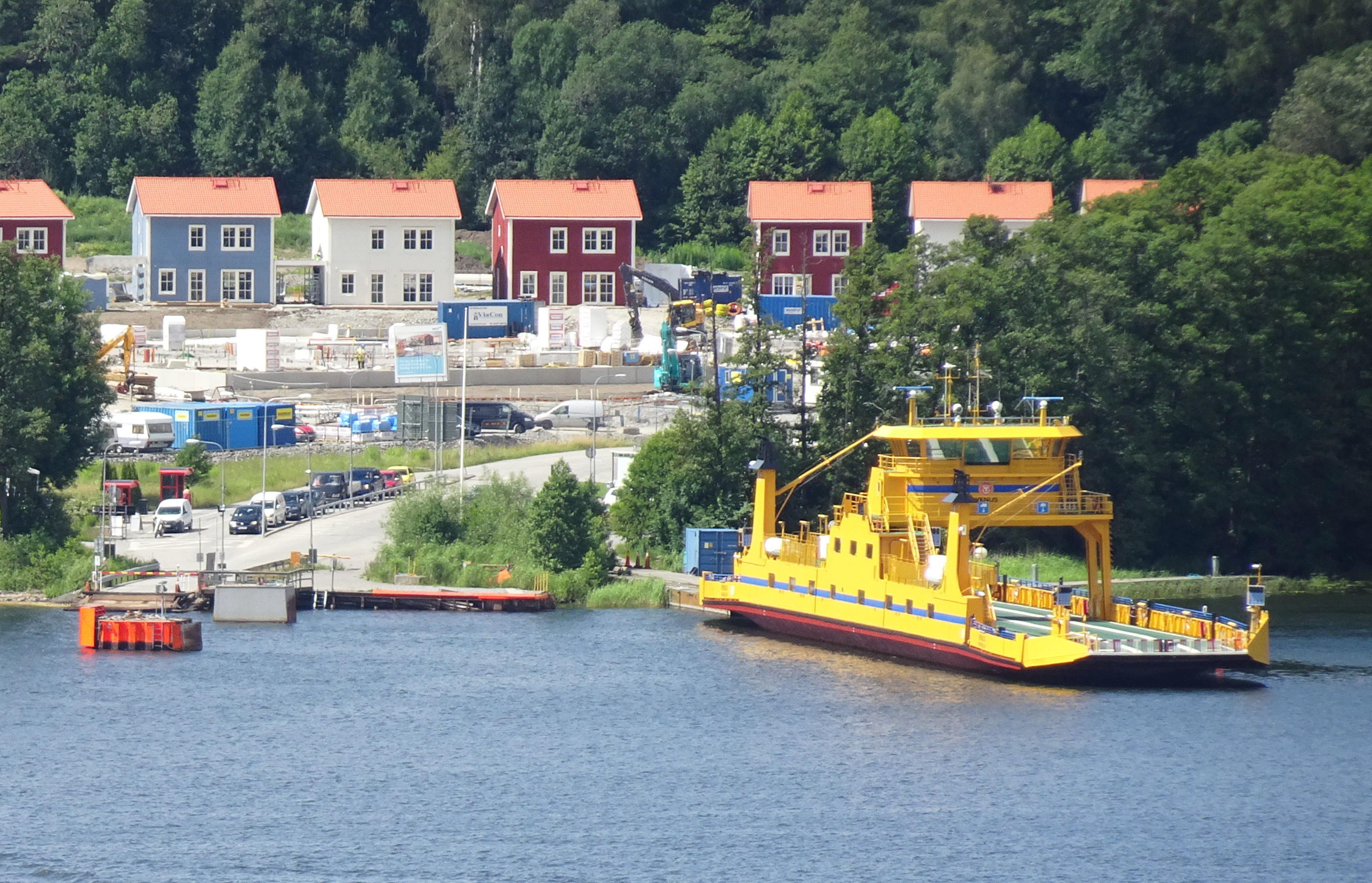 Bilfärja M/S Venus i färjeläget på Ekerö